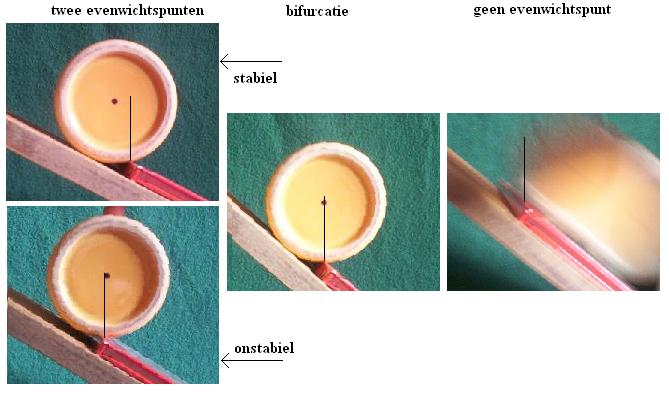 illustratie van een zadel-knoop bifurcatie